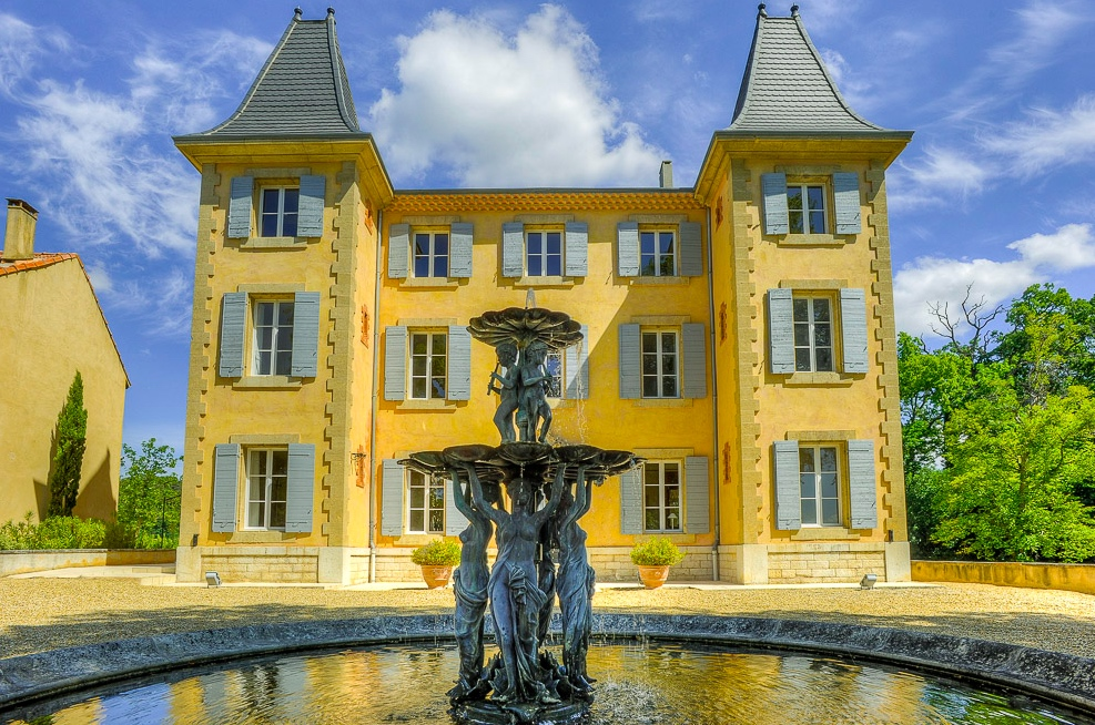 Facade principale du château de La Brillanne